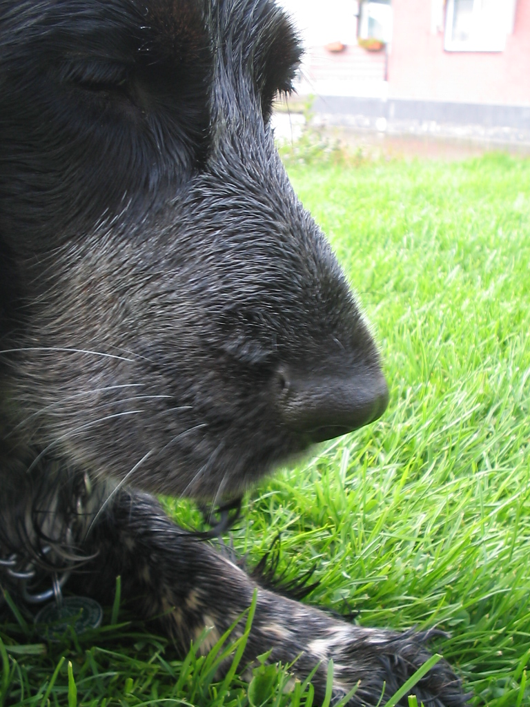 Snuit van een hond (Elbi, 2005) Categorie:Wikipedia:Afbeeldingen/Gebruiker:Michiel1972 Categorie:Afbeelding hond